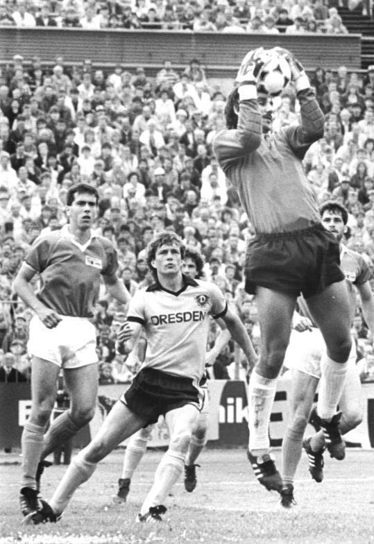 ADN-ZB-Häßler- 3-6-89-ba-Dresden: Fußball-Oberliga-Die einen waren schon vorher Meister - die anderen standen schon als Absteiger fest. In der Begegnung zwischen der SG Dynamo Dresden und dem 1. FC Union Berlin gab es einen 5:0 Sieg der Platzbesitzer. In dieser Szene kann Torsten Gütschow seinen "Torriecher" nicht beweisen, Union-Hüter Lihsa ist schneller. Trotzdem traf der Dynamo-Stürmer dreimal und wurde mit 17 Treffern Torschützenkönig der Saison."